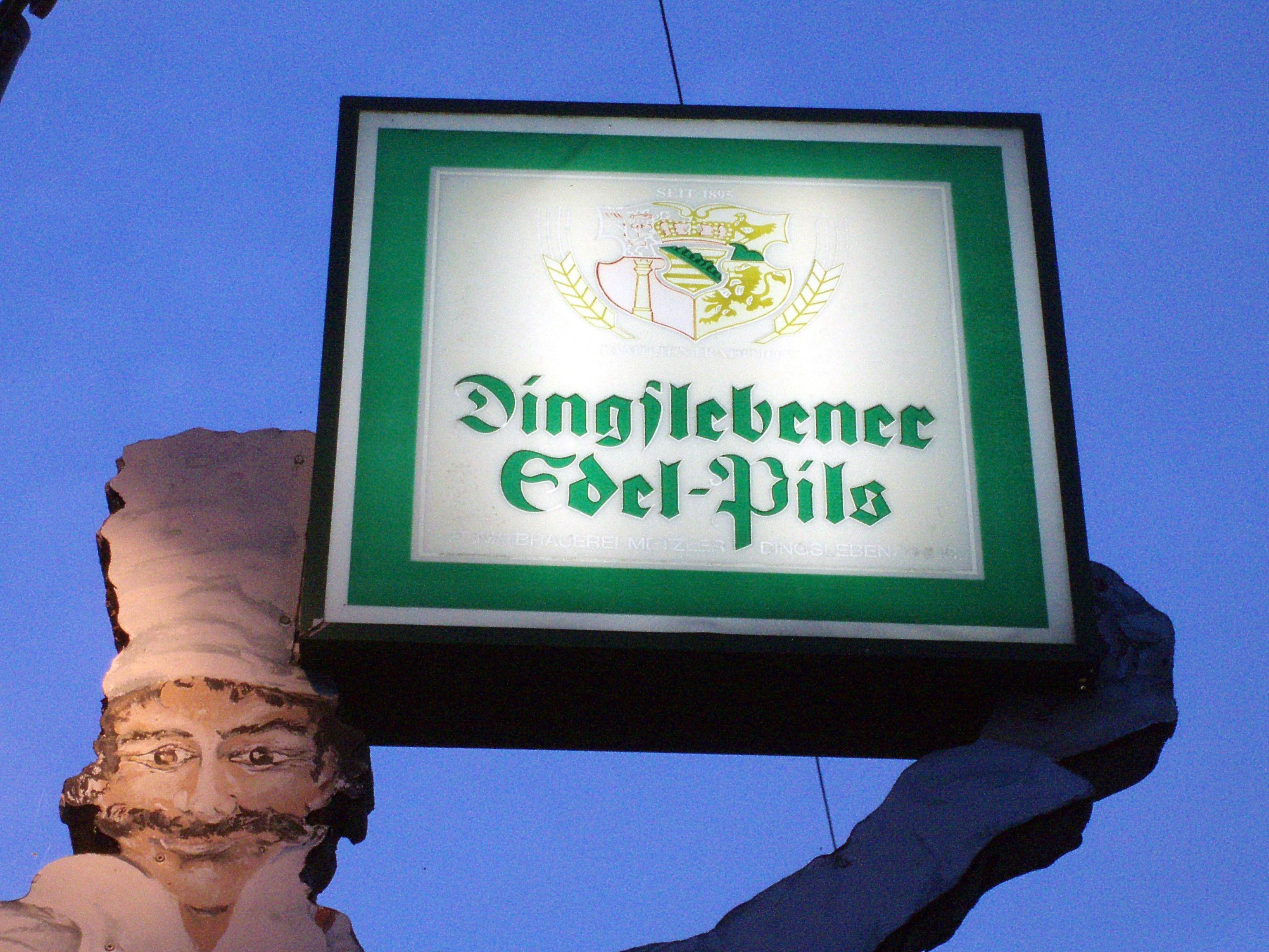 Dingslebener Edel-Pils